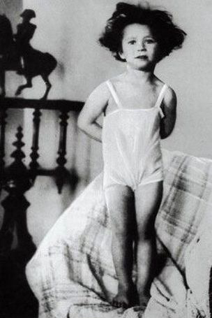 Майя Плисецкая в детстве